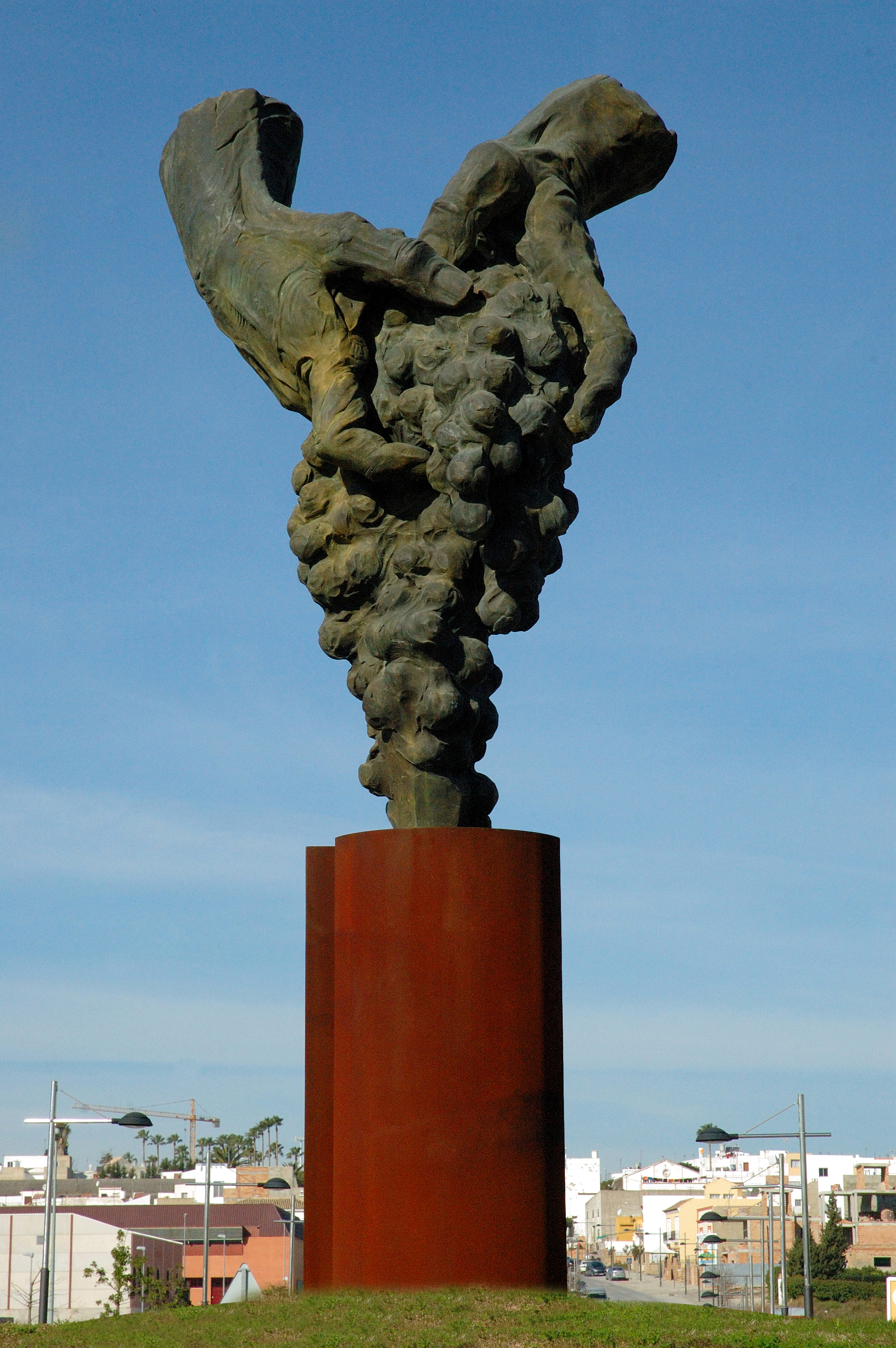 Monumento al viticultor en Trebujena (Cádiz). Año 2007